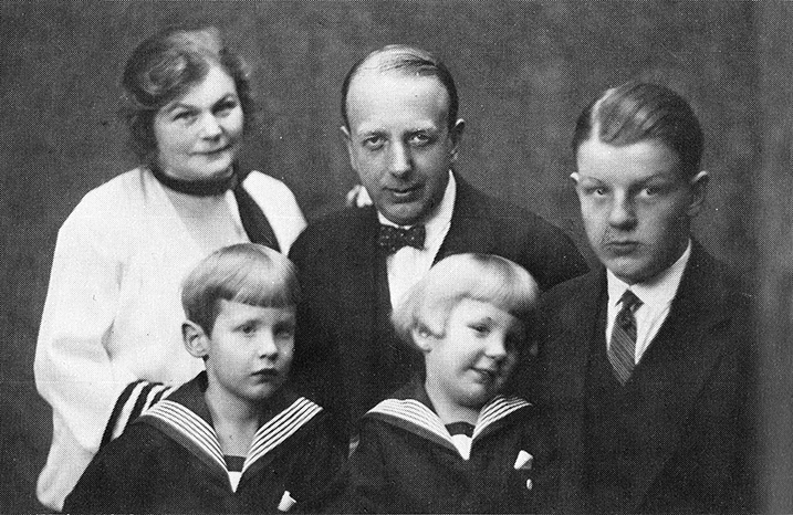 Makarna Anna Hammarén (1888–1972) och Torsten Hammarén (1984–1962) och sonen Per-Thorsten (1911–2008). Framför dem yngsta sönerna Carl-Erik (1922–1990) och Carl (1923–1994).